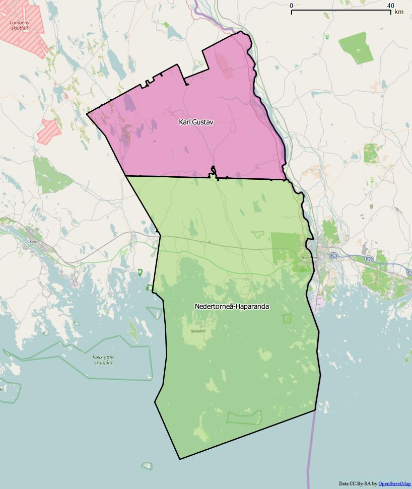 Distriktsindelningen i Haparanda kommun